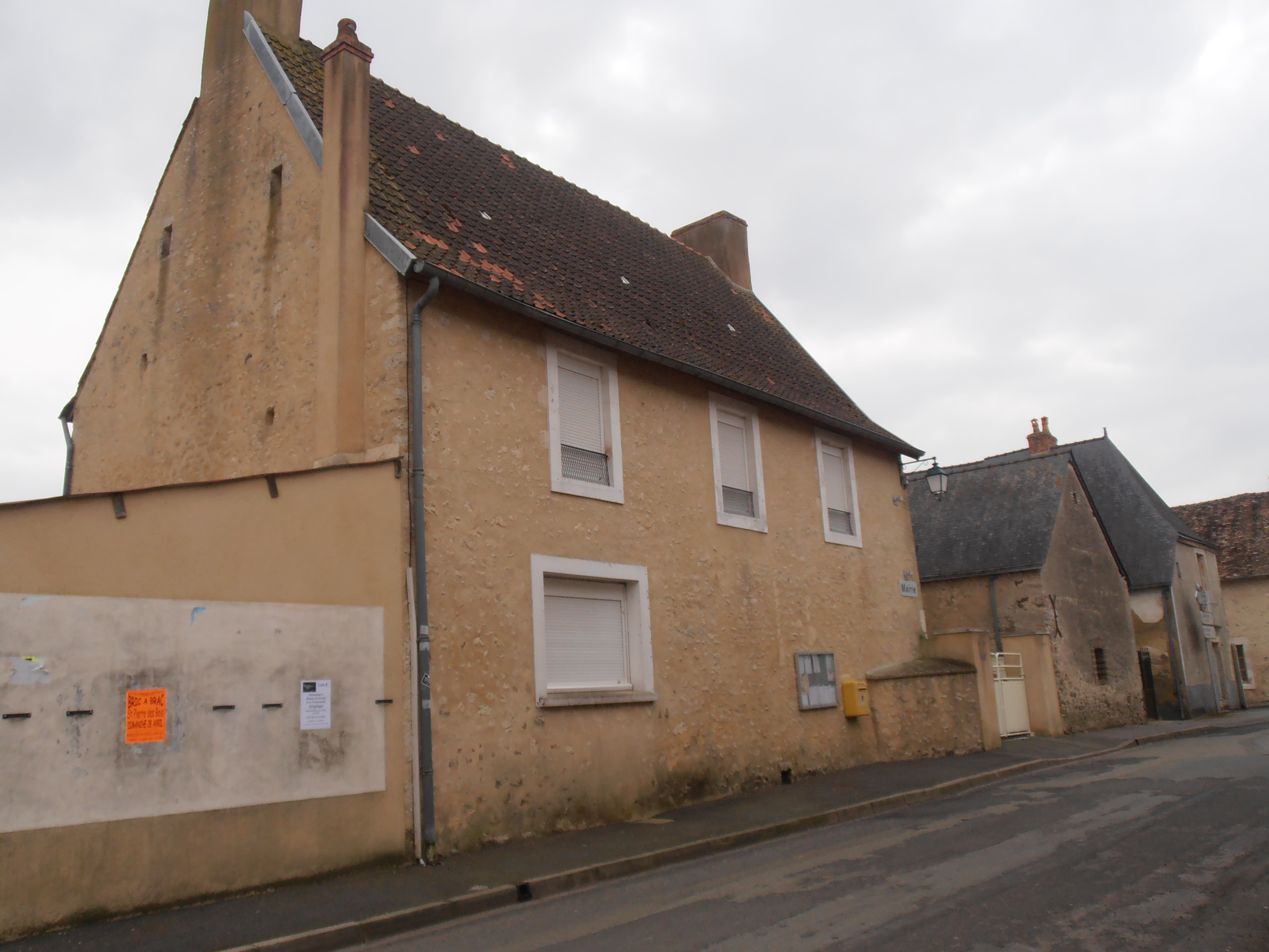 La mairie de Saint Ouen en Champagne